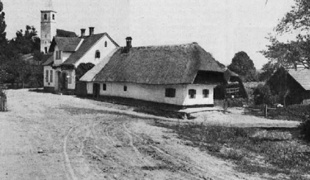 Večeslavci na Goričkem s cerkvijo sv. Helene.